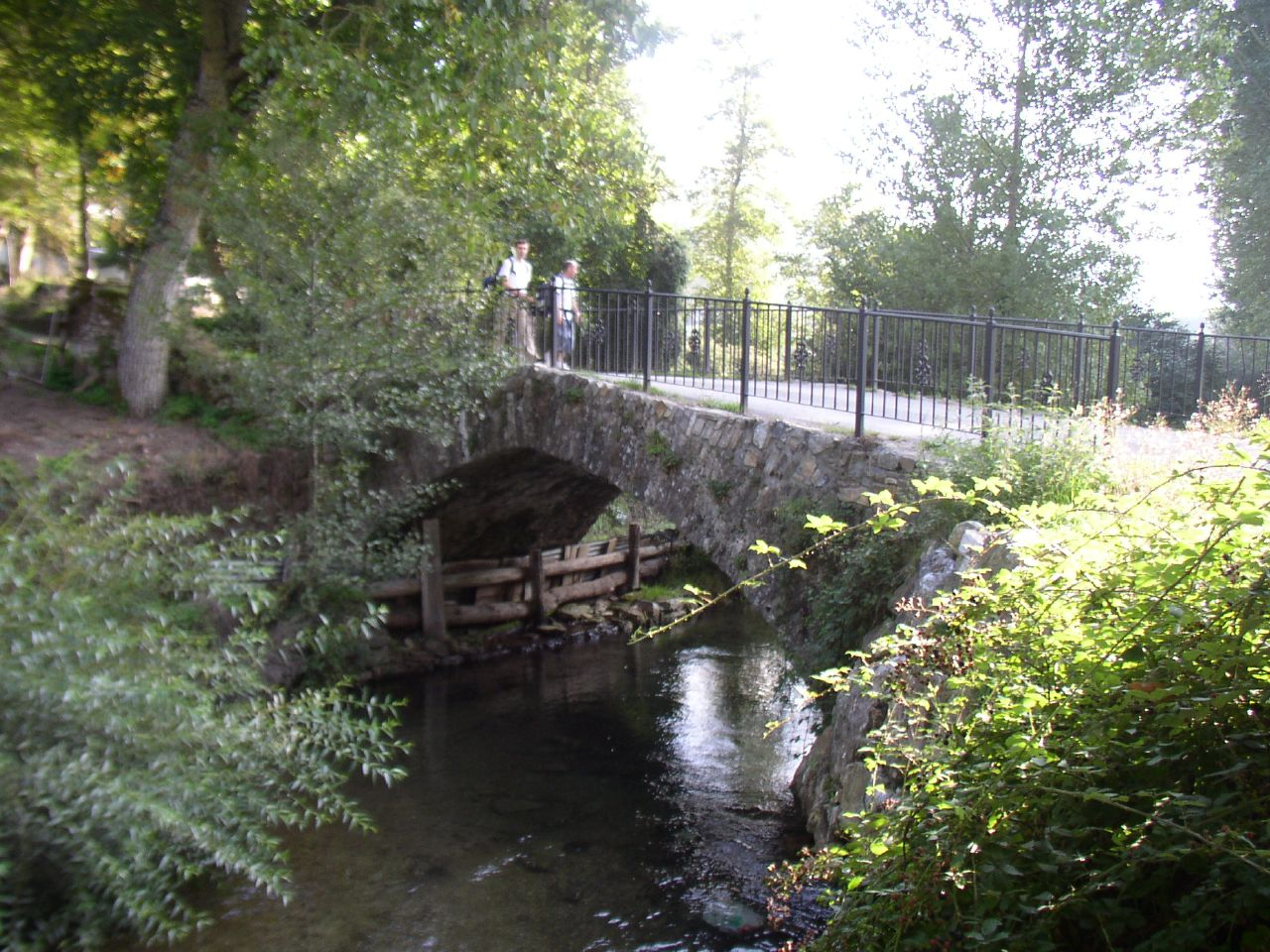 Puente romano sobre el río Valcarce.